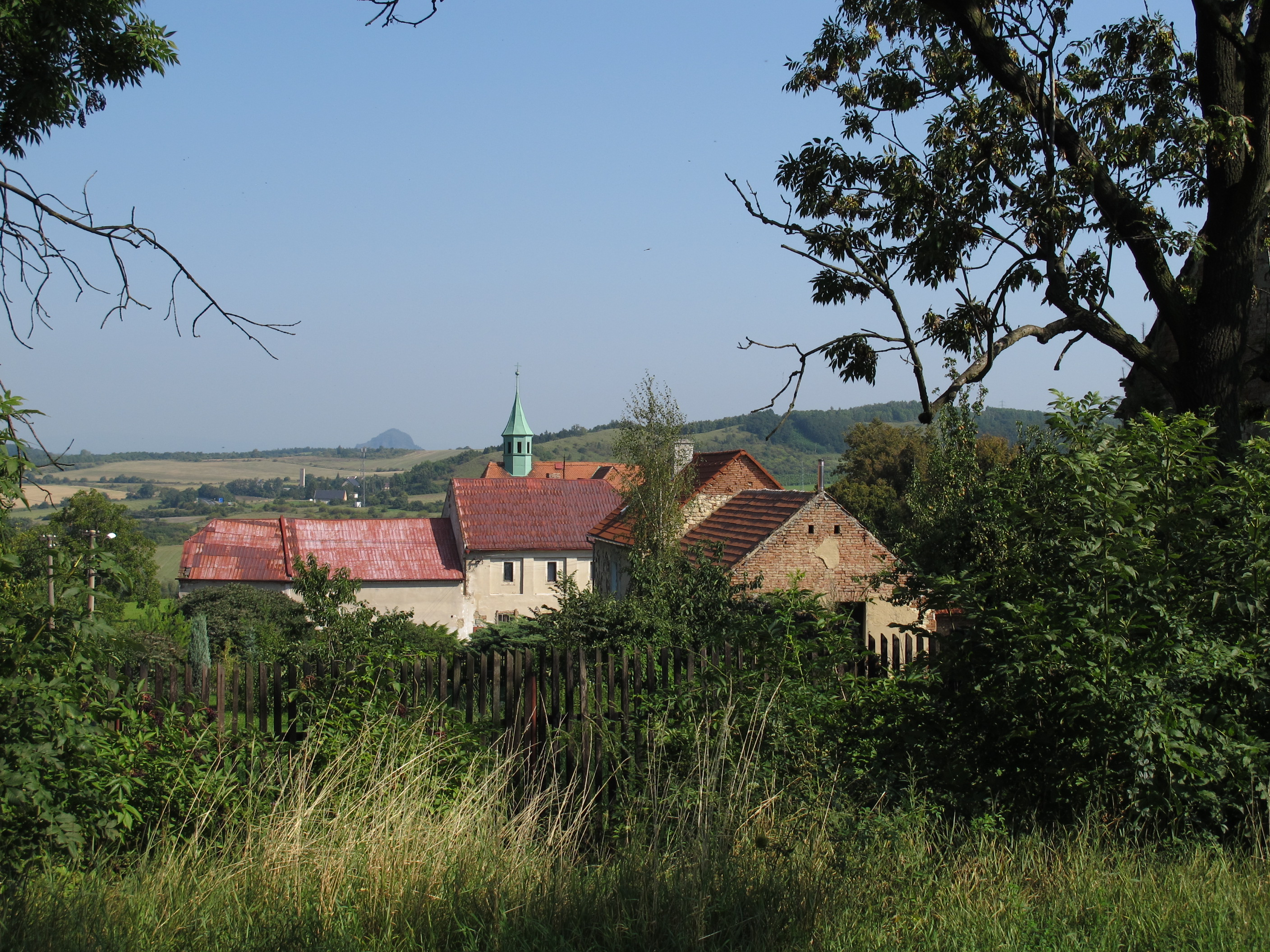 Osada Bedřichův Světec, okres Most